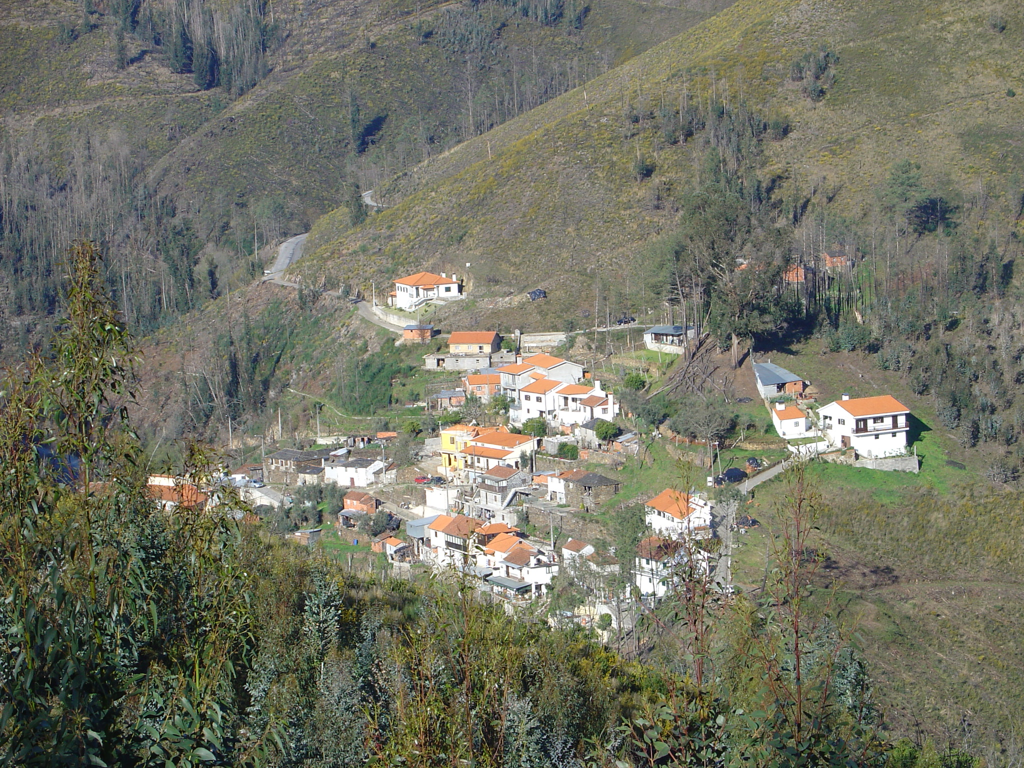 Paradinha